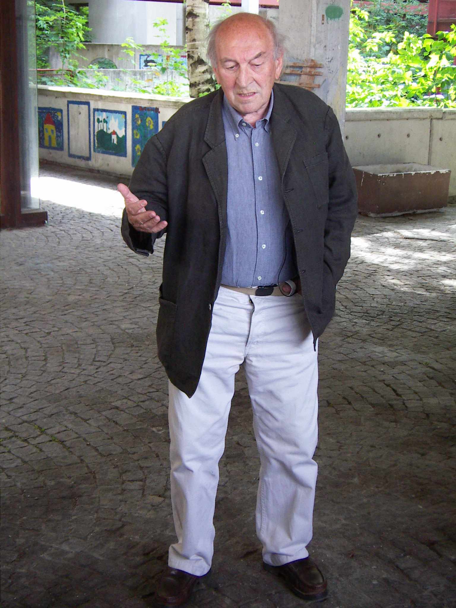 Architekt Anton Schweighofer, Stadt des Kindes, Wien